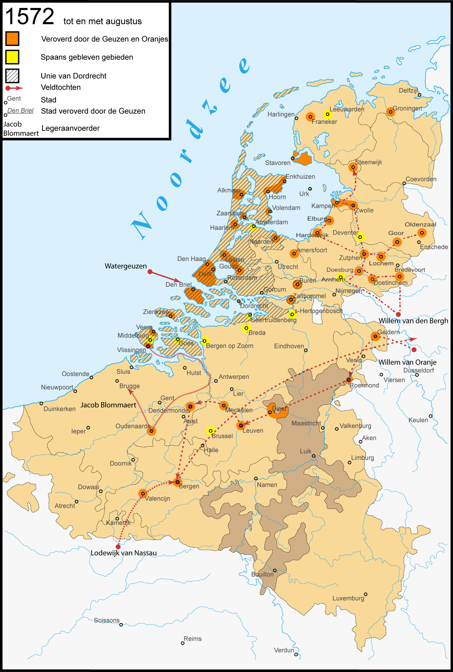 Krijgsbewegingen in de Tachtigjarige Oorlog: 1572 tot en met augustus. Nederlandse versie Engels: Warprogression in het Eighty Years' War: 1572 until august. Dutch version